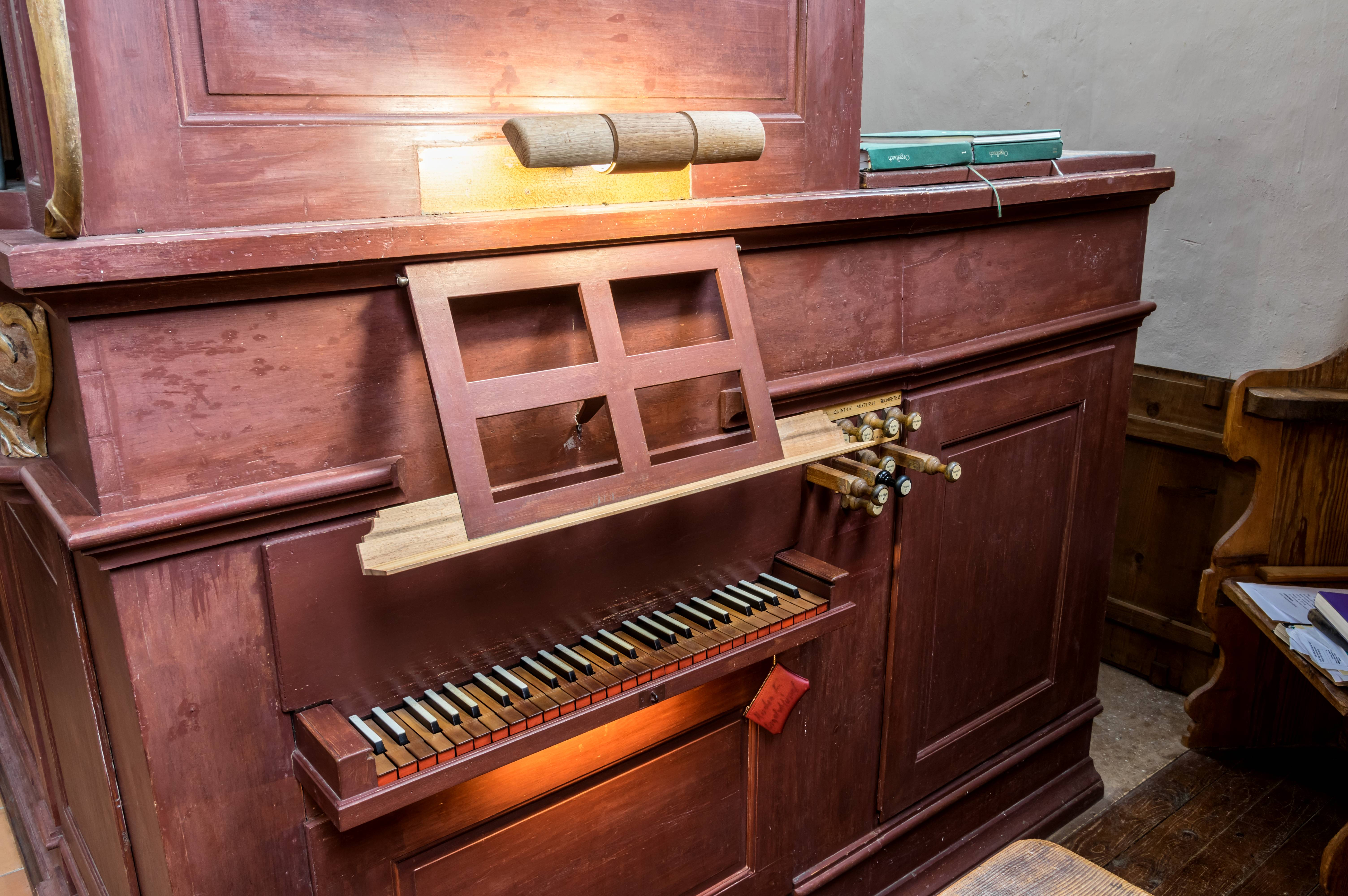 Bilder aus der evangelischen Kirche in Fischingen Die Orgel von Xaver Bernauer aus dem Jahre 1810 Der Spieltisch